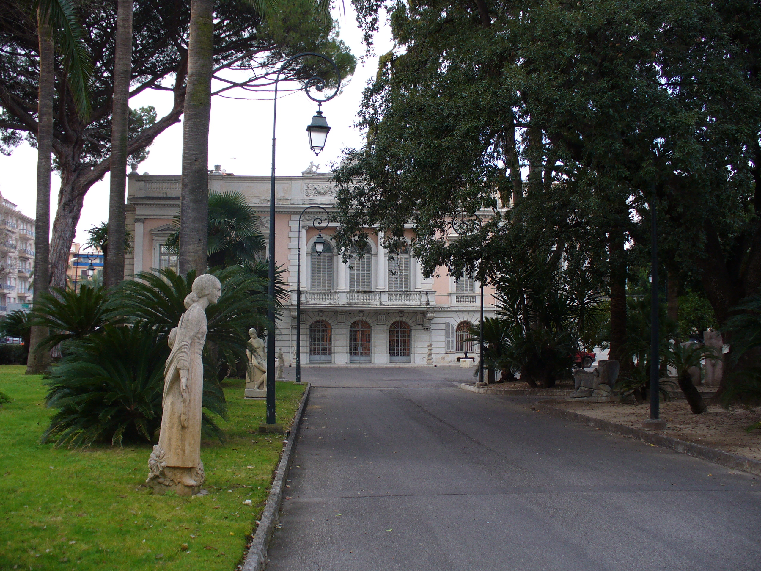 Jardin d'agrumes du Palais Carnolès à Menton.